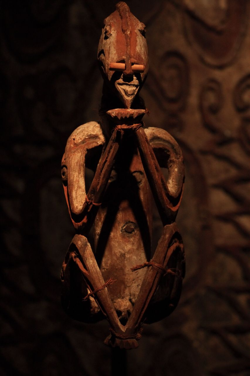 Venster 2 (De wapens van Jan van Valkenburg en zijn echtgenoot Johanna van Voorne, vrouwe van Bergen op Zoom.)Vrouwenfiguur uit het Noordwest-Asmatgebied, voor 1913 (1971-985) In het kader van "Wiki loves art NL".